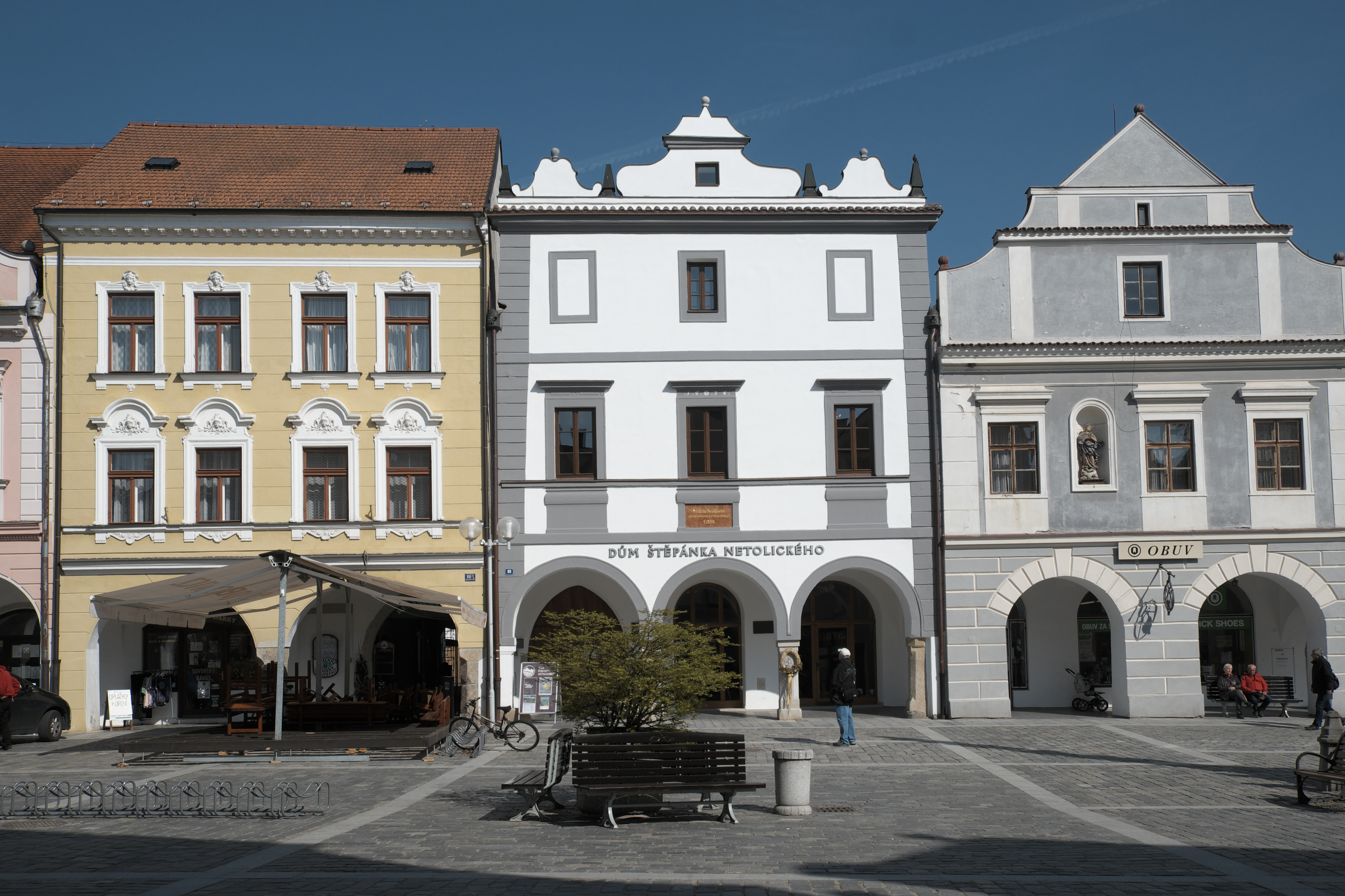 Masarykplatz in Třeboň im Okres Jindřichův Hradec in der Südböhmischen Region (Jihočeský kraj) in Tschechien